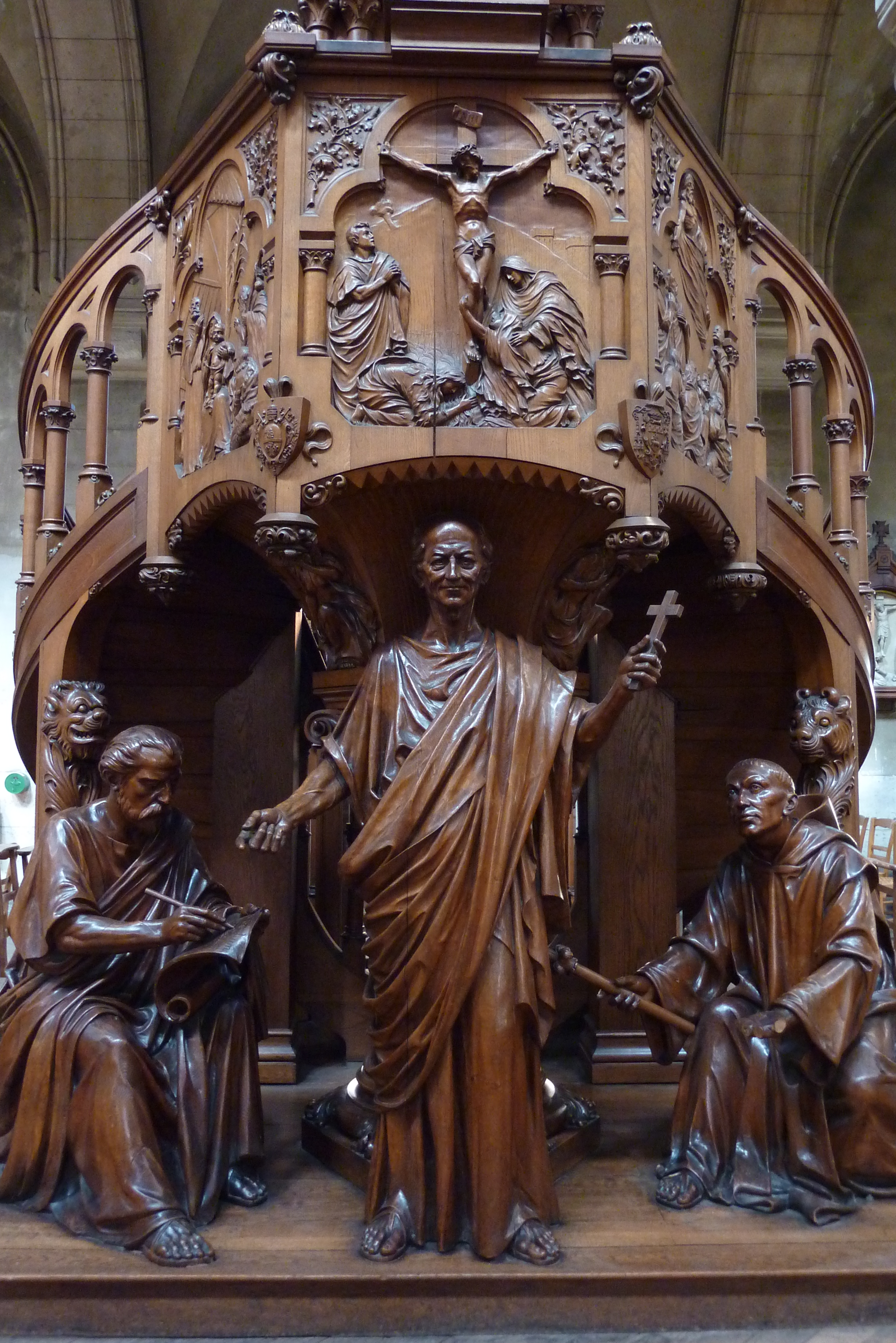 Kanzel (Ausschnitt) in der katholischen Pfarrkirche Saint-Clodoald in Saint-Cloud